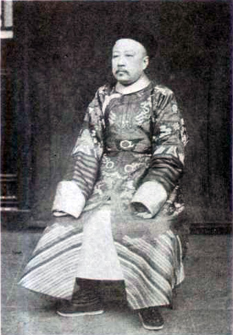 陈夔龙（1857年－1948年），又名夔鳞，字筱石，贵州省贵阳人，清末封疆大员，其文才洋溢，书法、诗文自成一家。著有《梦蕉亭杂记》、《庸庵尚书奏议》、《花近楼诗存》等。